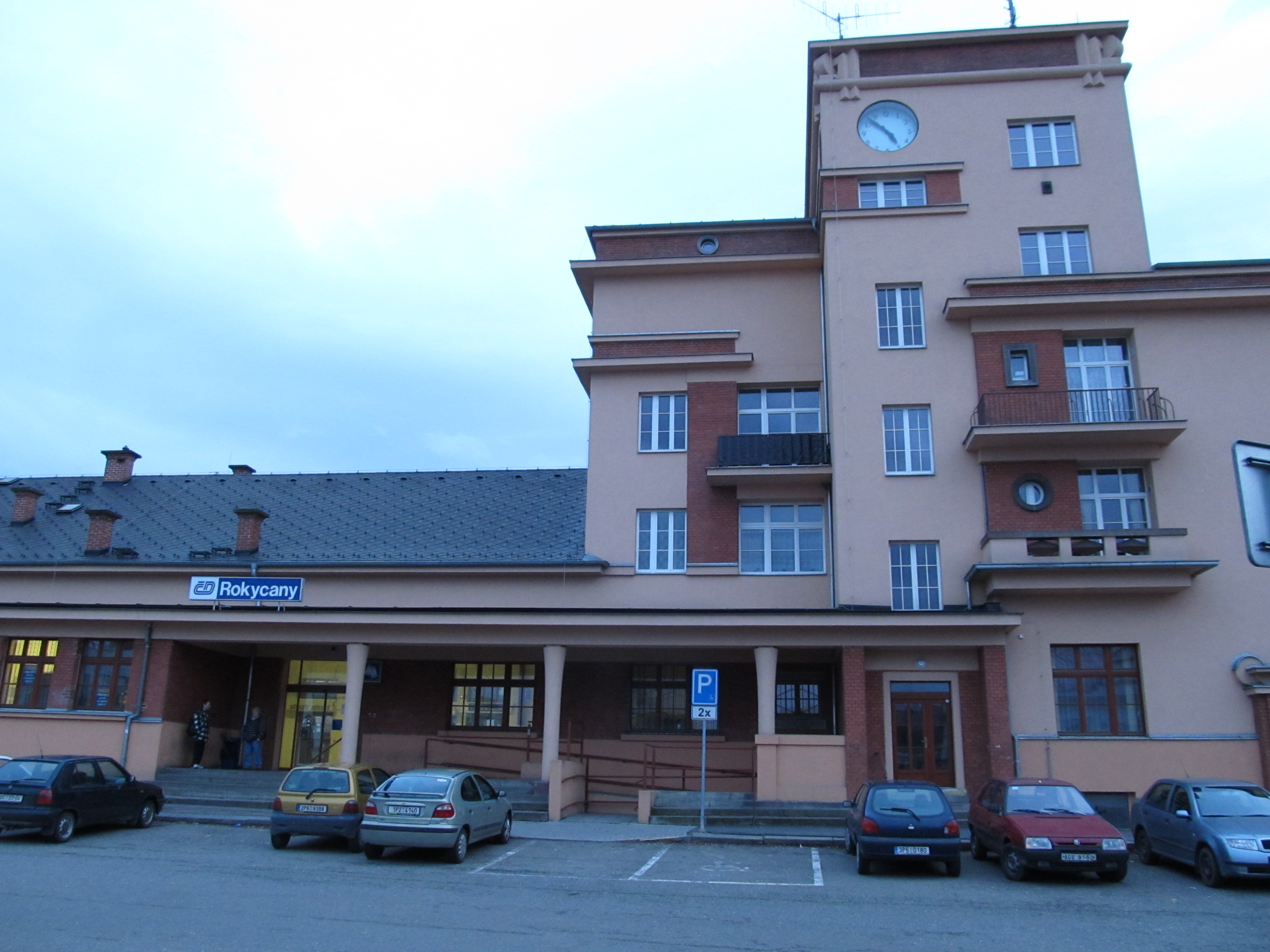 Rokycany - nádraží